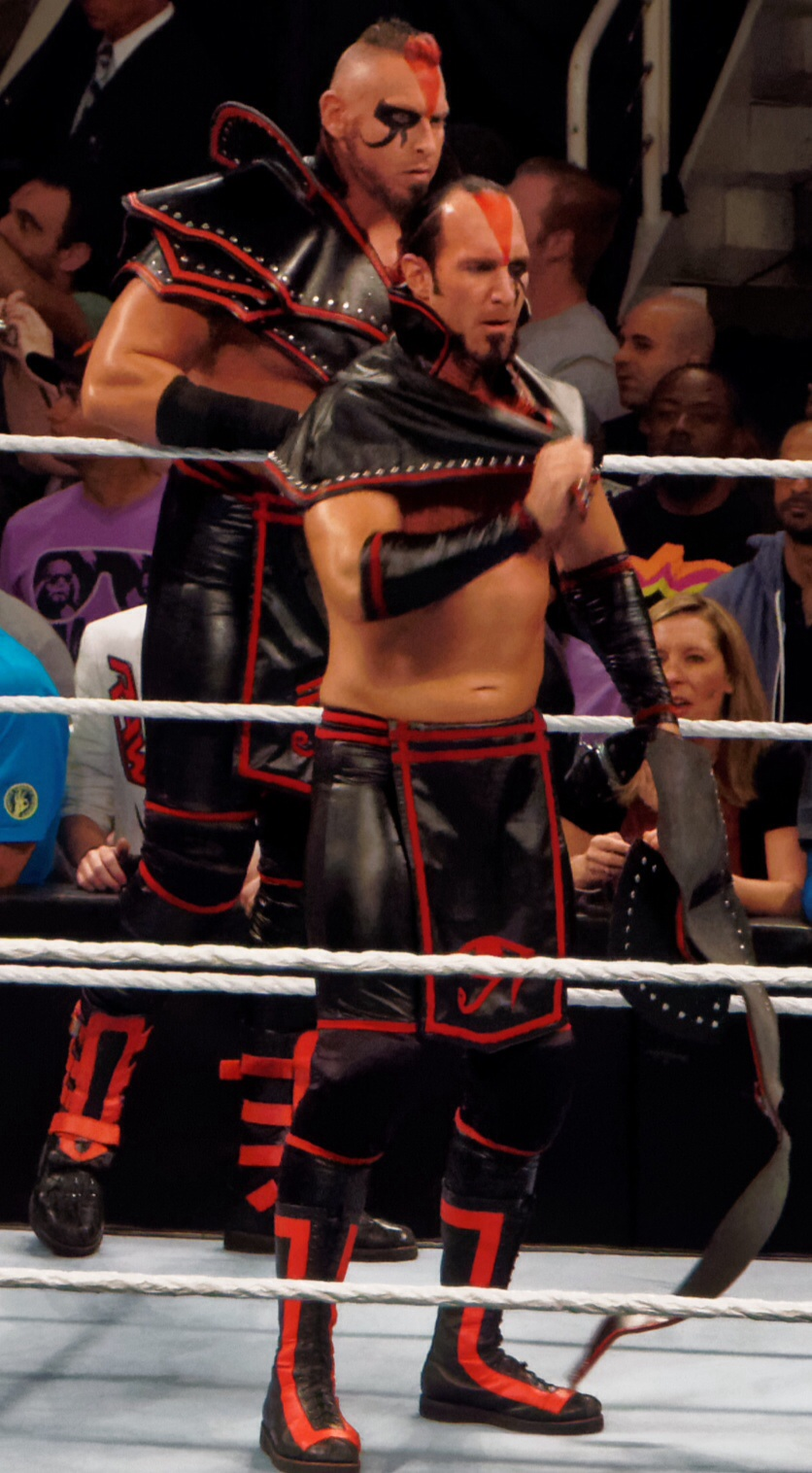 2015-03-30_17-38-59_ILCE-6000_0960_DxO